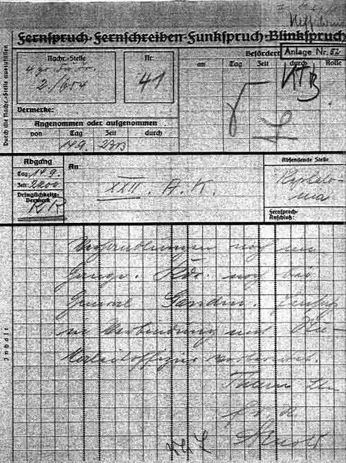 Kess (o Keff o Keffalonie?) Funkspruch Hoch stelle [...] 2/654 Nr. 41 Befordert Anlage Nr. 54 durch: KTB (Kriegstagebuch?) Angenommen oder aufgenommen: Tag: 14 9 Zeit: 23:13 Abgang: Tag: 14 9 Zeit: 22:00 An: XXII A.K. (ArmeeKorps?) Absendende Stelle: Kephalonia Inhalt: Verhandlungen noch im Gange. Kdr (Kommandantur?) noch bei General Gandin. Einsatz in Verbindung mit Stukaleitoffizier vorbereitet. Thun Ltn (Leutnant)